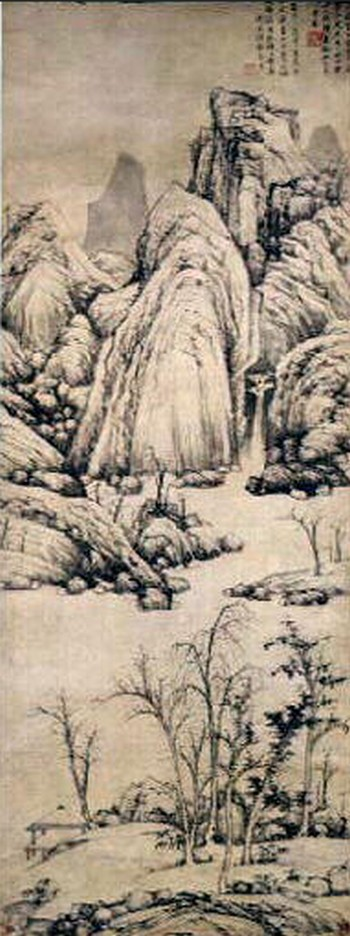 Paysage de montagne ou Retraite dans la montagne par le peintre chinois Liu Jue (1410-1472), poème du peintre et inscription de Shen Zhou. Encre sur papier, rouleau en hauteur, 149x55cm. Signé : Wanan et sceaux. Propriété de l'État, date d'achat 1937. Conservé à Paris au Musée national des arts asiatiques - Mus. Guimet. Ancienne appartenance : J.P. Dubosc.